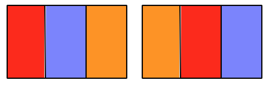 Exemple de dues imatges que tindrien serien aparellades segons les caractéristiques però no tindrien les mateixes caraterístiques en la verificació geomètrica.